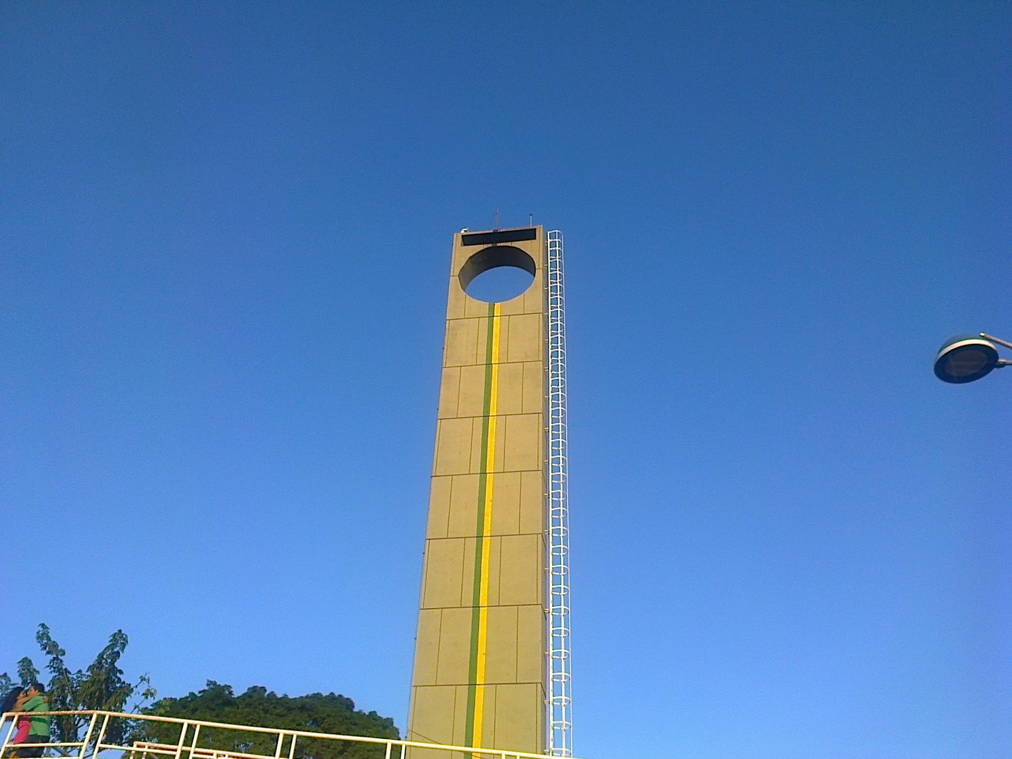 Linha do Equador Macapá AP,Brasil